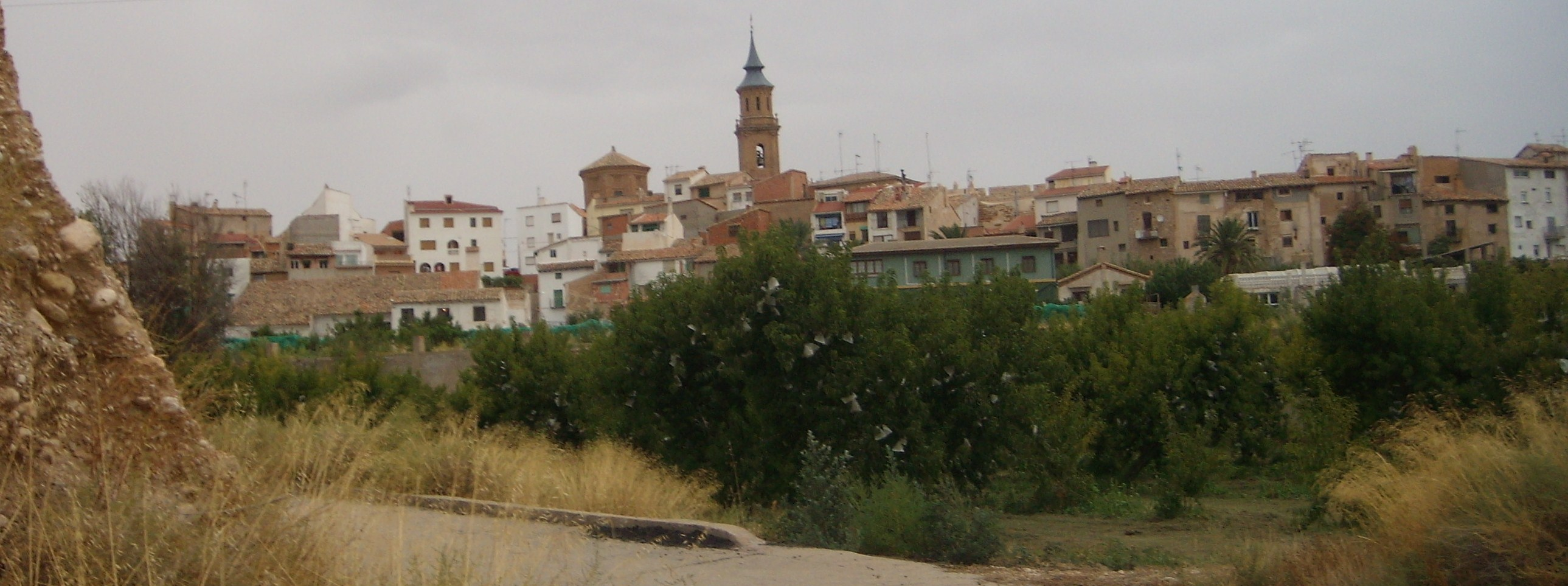 Vista parcial de Calanda.